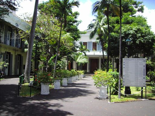 Supreme Court, Port Louis, Mauritius